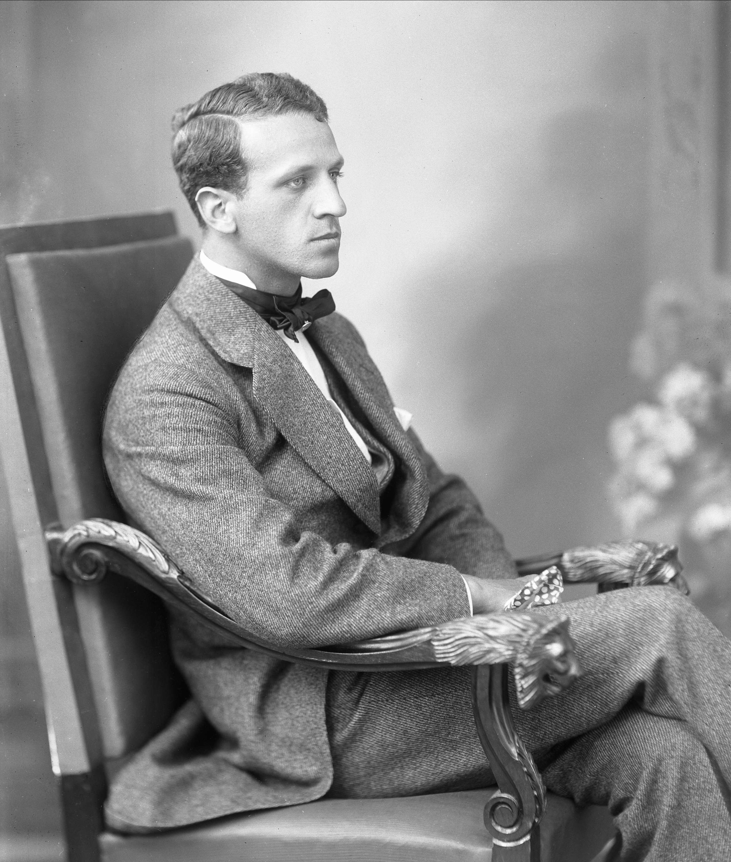 Skuespilleren Alfred Gjems Selmer (1893-1919), fotografert i 1916.